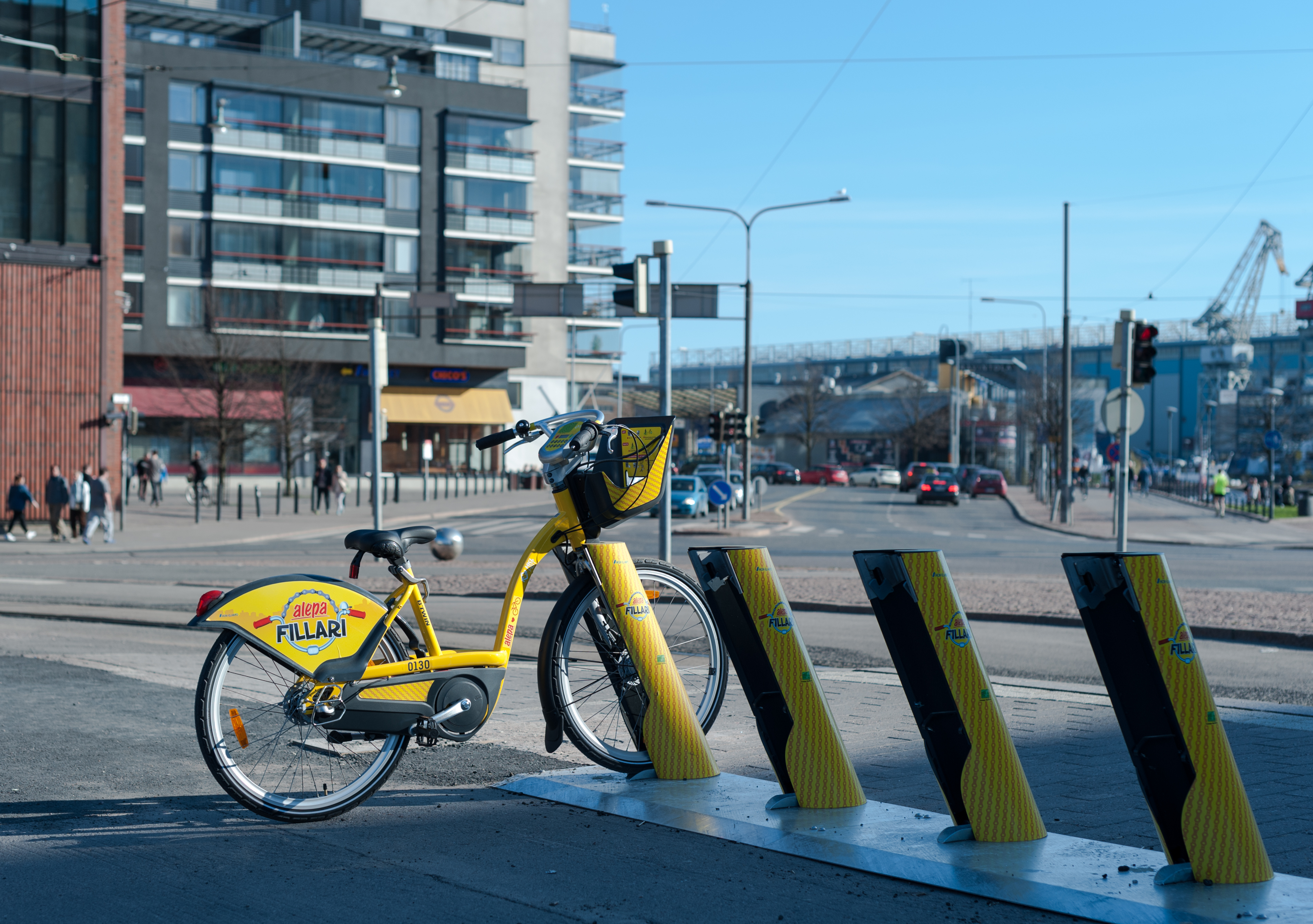 Helsingissä nykyään käytössä olevan kaupunkipyöräjärjestelmän polkupyörä ja pysäköintiasema.